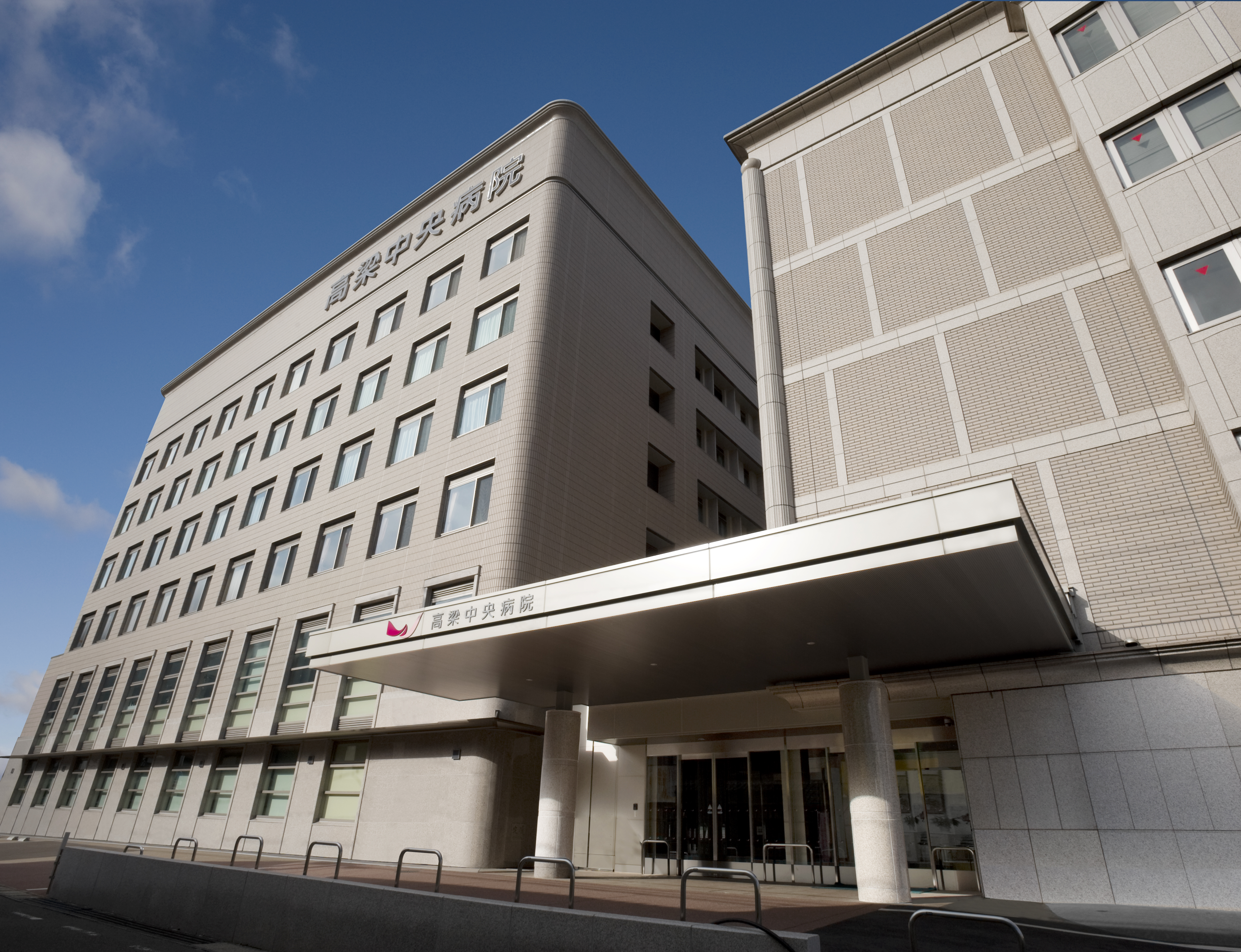 高梁中央病院の正面写真